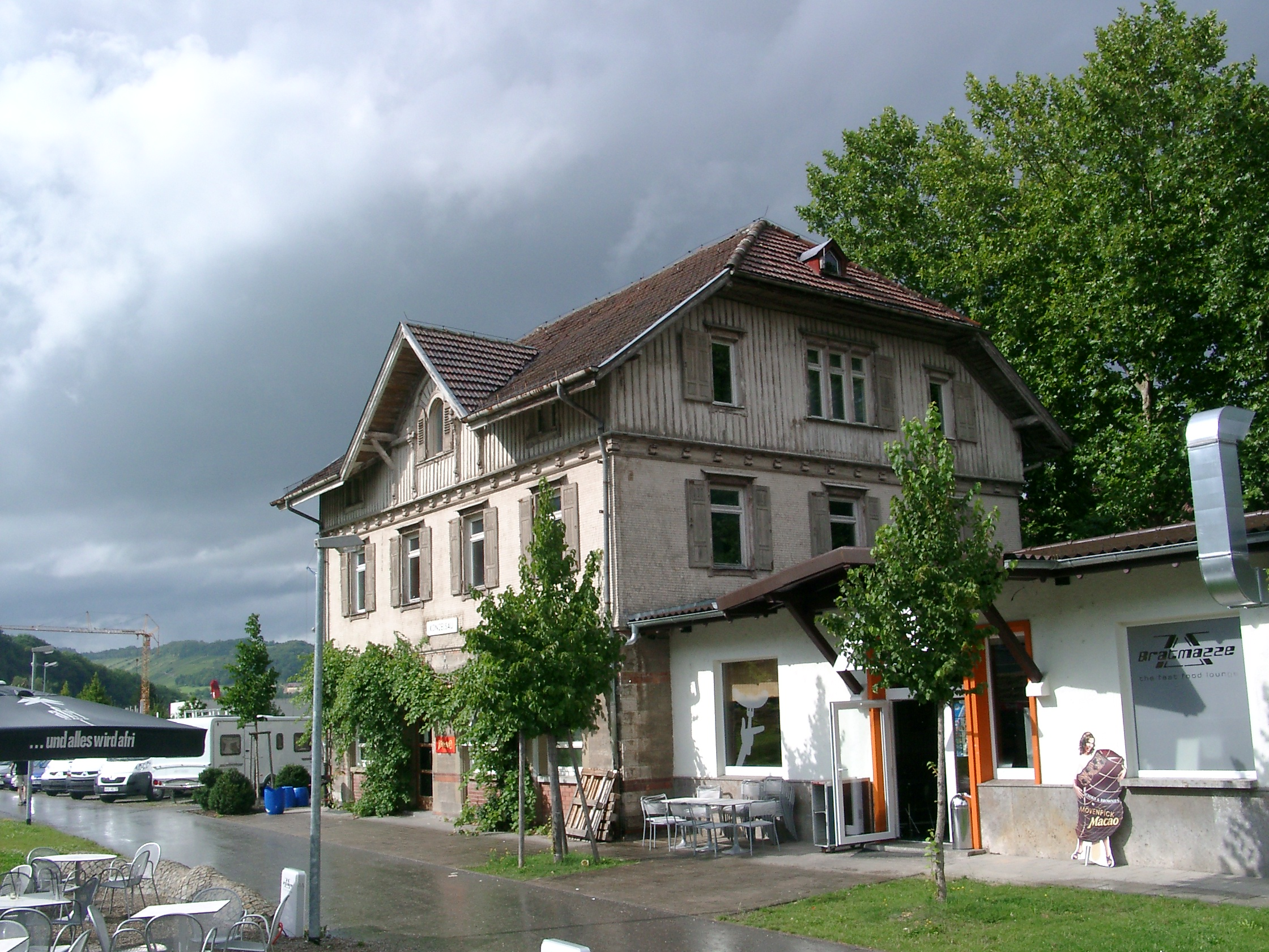 Künzelsau, stillgelegter Bahnhof